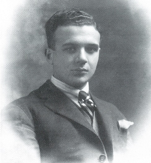 Gustavo Adolfo Rol